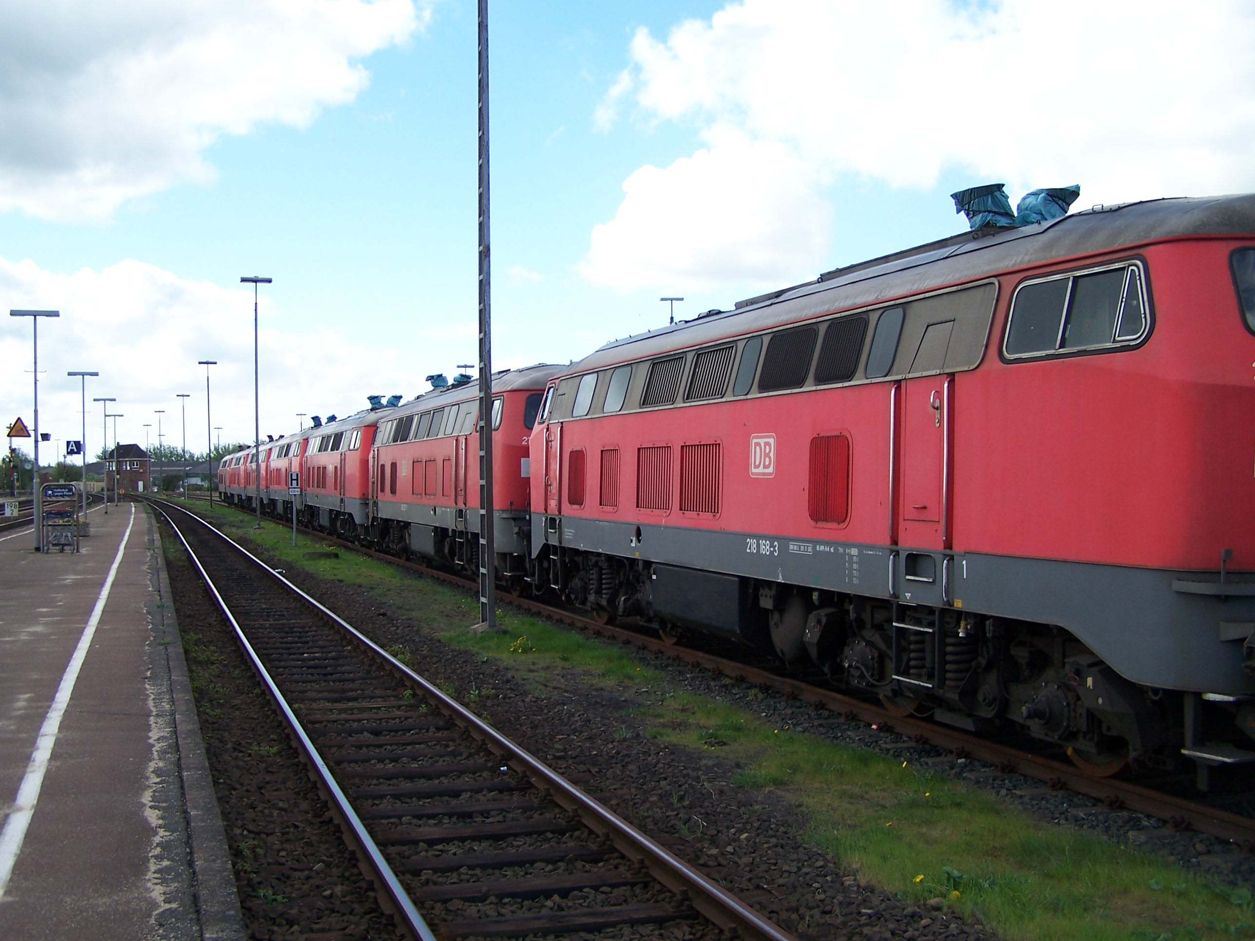 Loks der Baureihe 218 stehen, mehr oder minder präpariert, in Niebüll auf dem Abstellgleis und warten auf eine Verwendung.